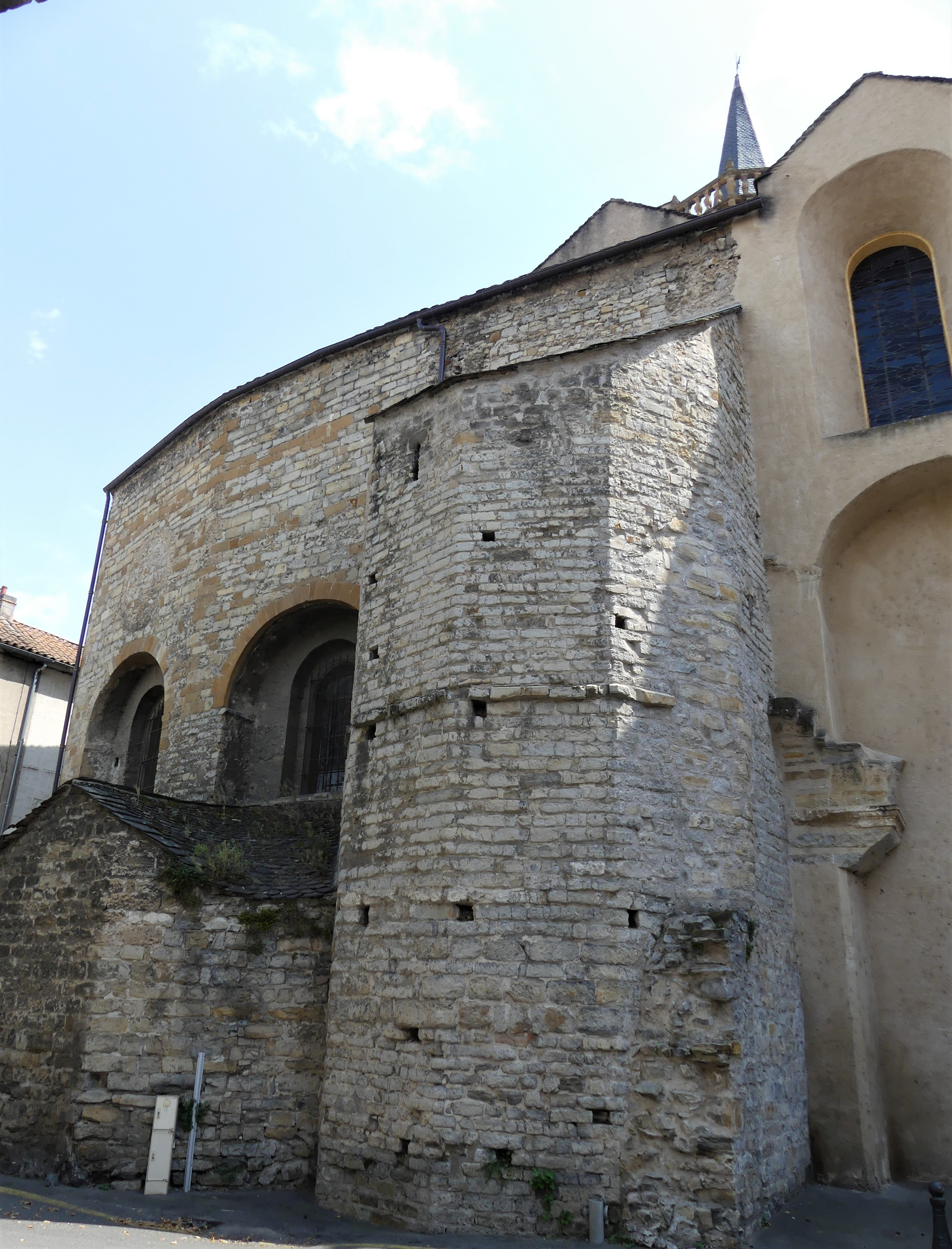 Contrefort nord de l'église Notre-Dame de l'Espinasse, Millau, Aveyron, France. Il s'agit en fait de la base d'un second clocher disparu.